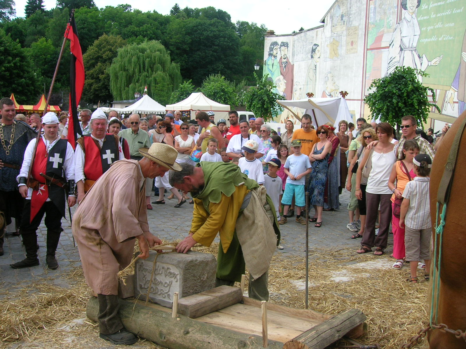 Montée de la première pierre du nouveau parement au donjon du château de Fontenoy-le-Château (88).